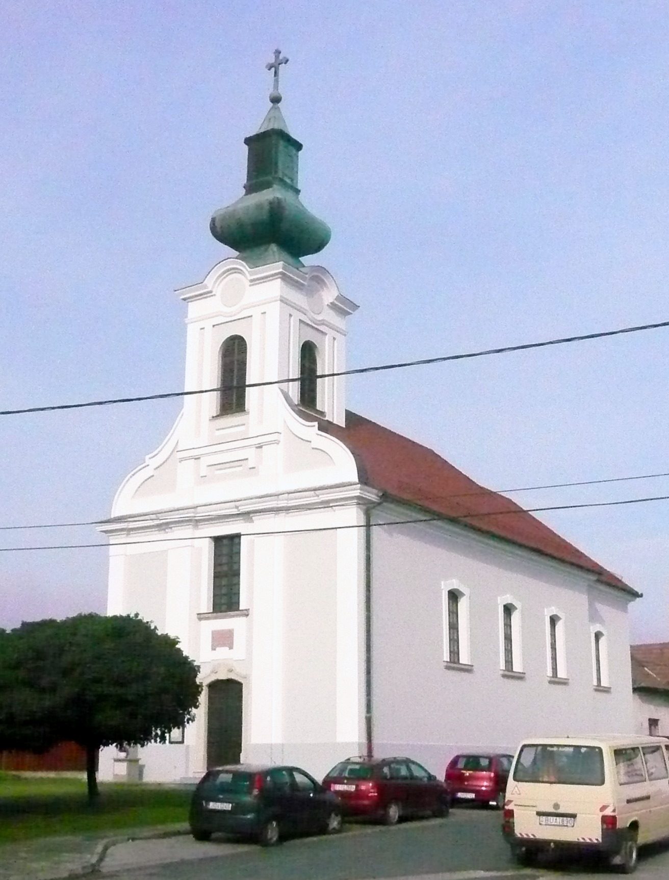 Az 1788-ban épült, és 2009-2010-ben felújított katolikus templom.